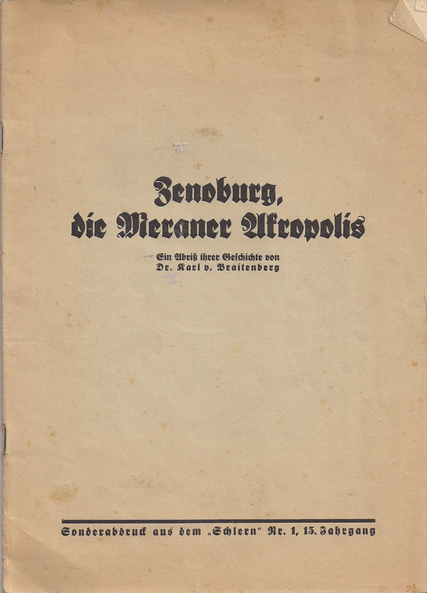 Karl von Braitenberg: Zenoburg, die Meraner Akropolis in Der Schlern Bd. 15 (1934) S. 15-34